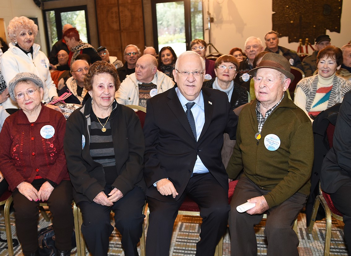 ניצולי השואה עם כבוד הנשיא מר ראובן ריבלין בביקור לרגל יום השואה